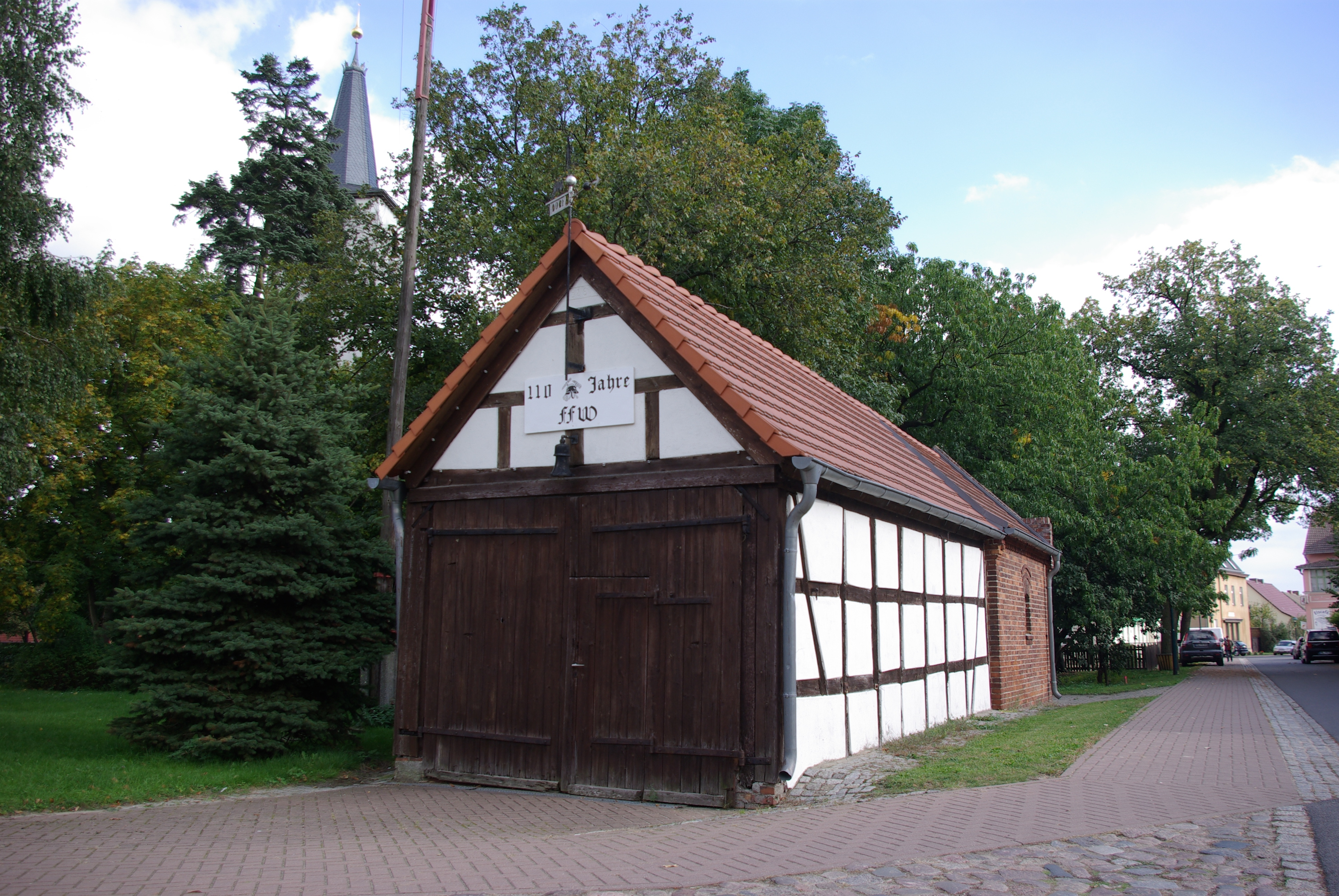 Oderaue in Brandenburg. Das Feuerwehrhaus in der Dorfmitte. Im Hindergrund ist der Turm der Kirche zu sehen.